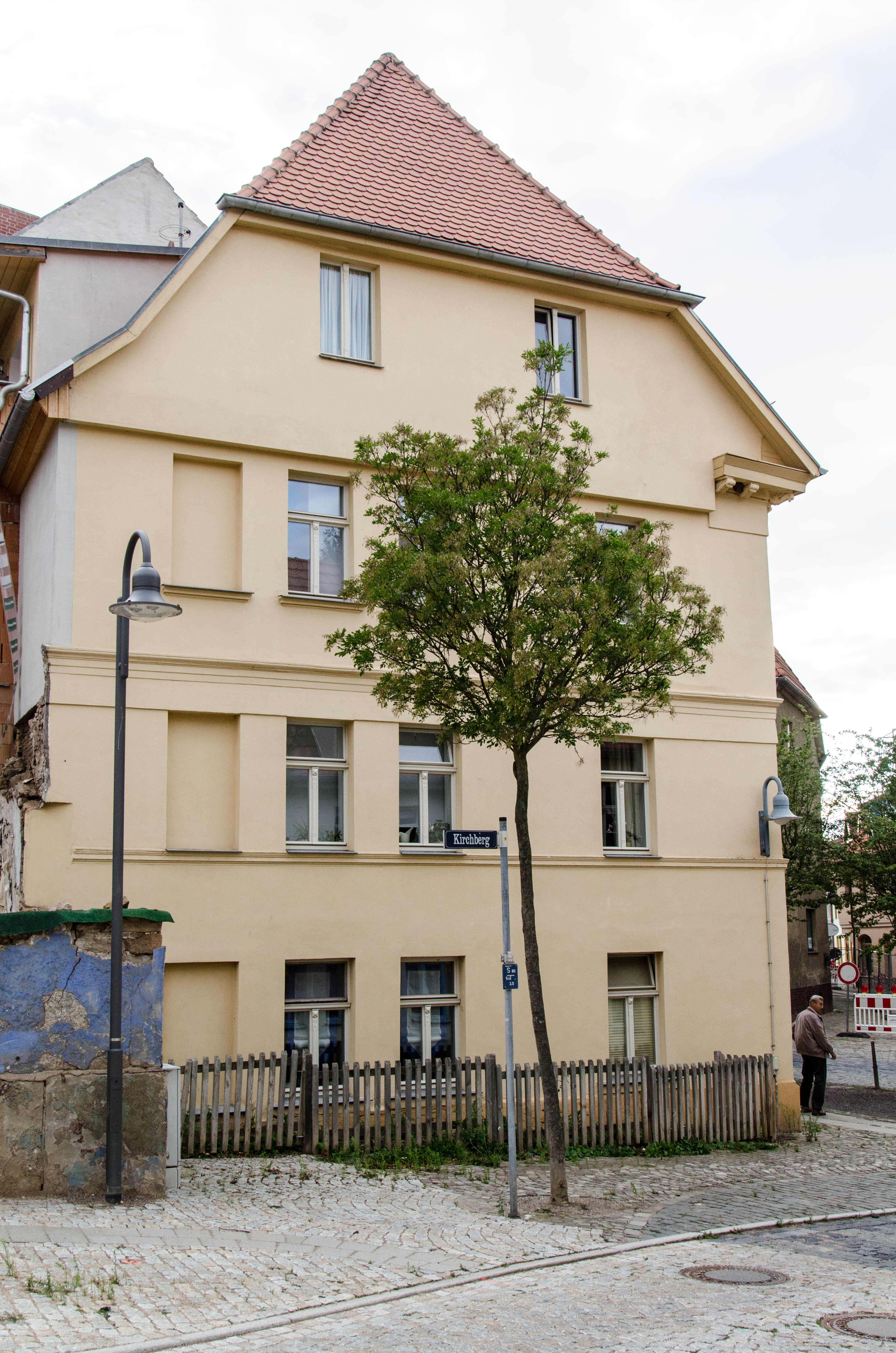 Sangerhausen, Wassertorstraße 10